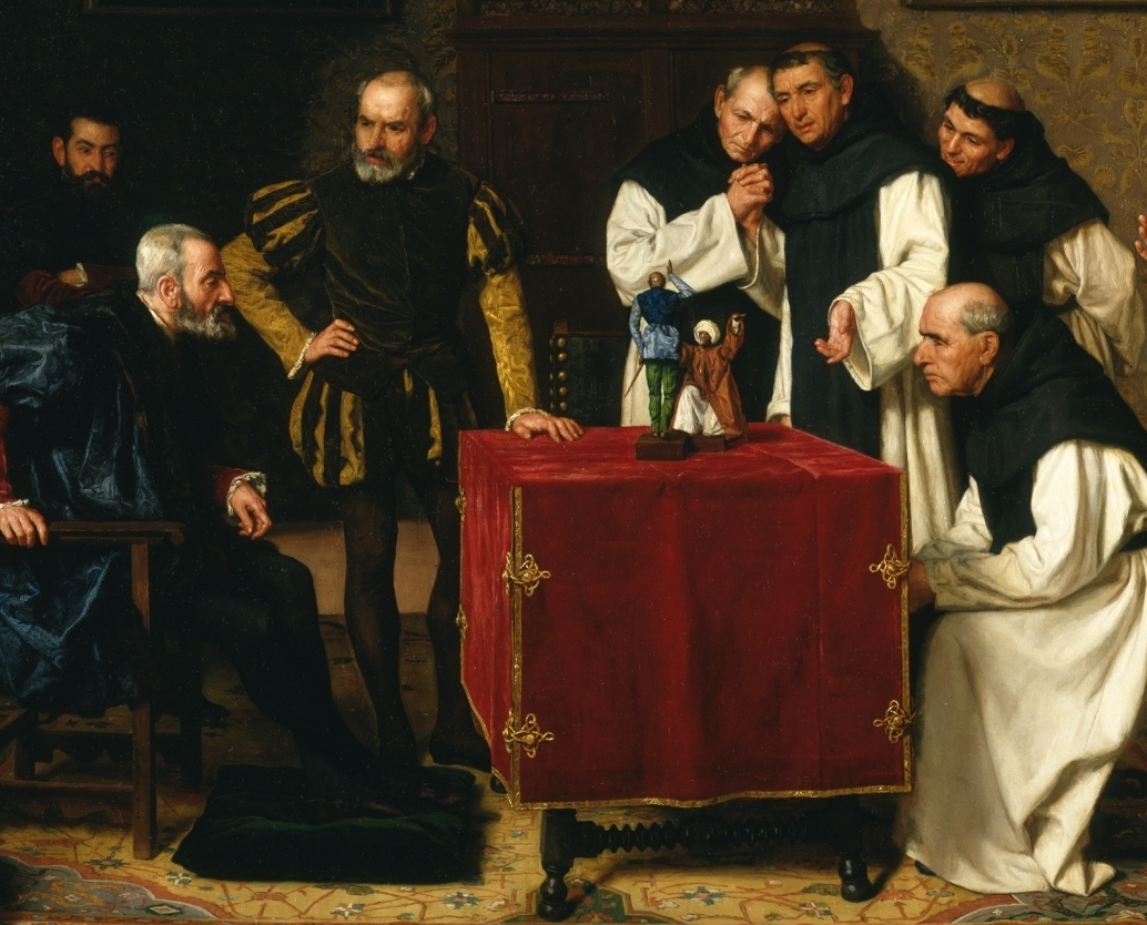 La obra representa al emperador Carlos I de España (1500-1558), durante su retiro en el monasterio de Yuste.